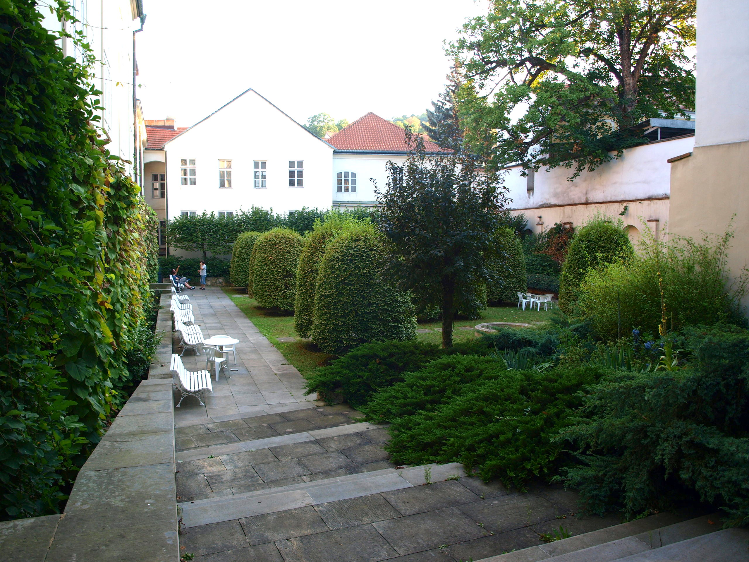 Lichtenštejnský palác na Malostranském náměstí